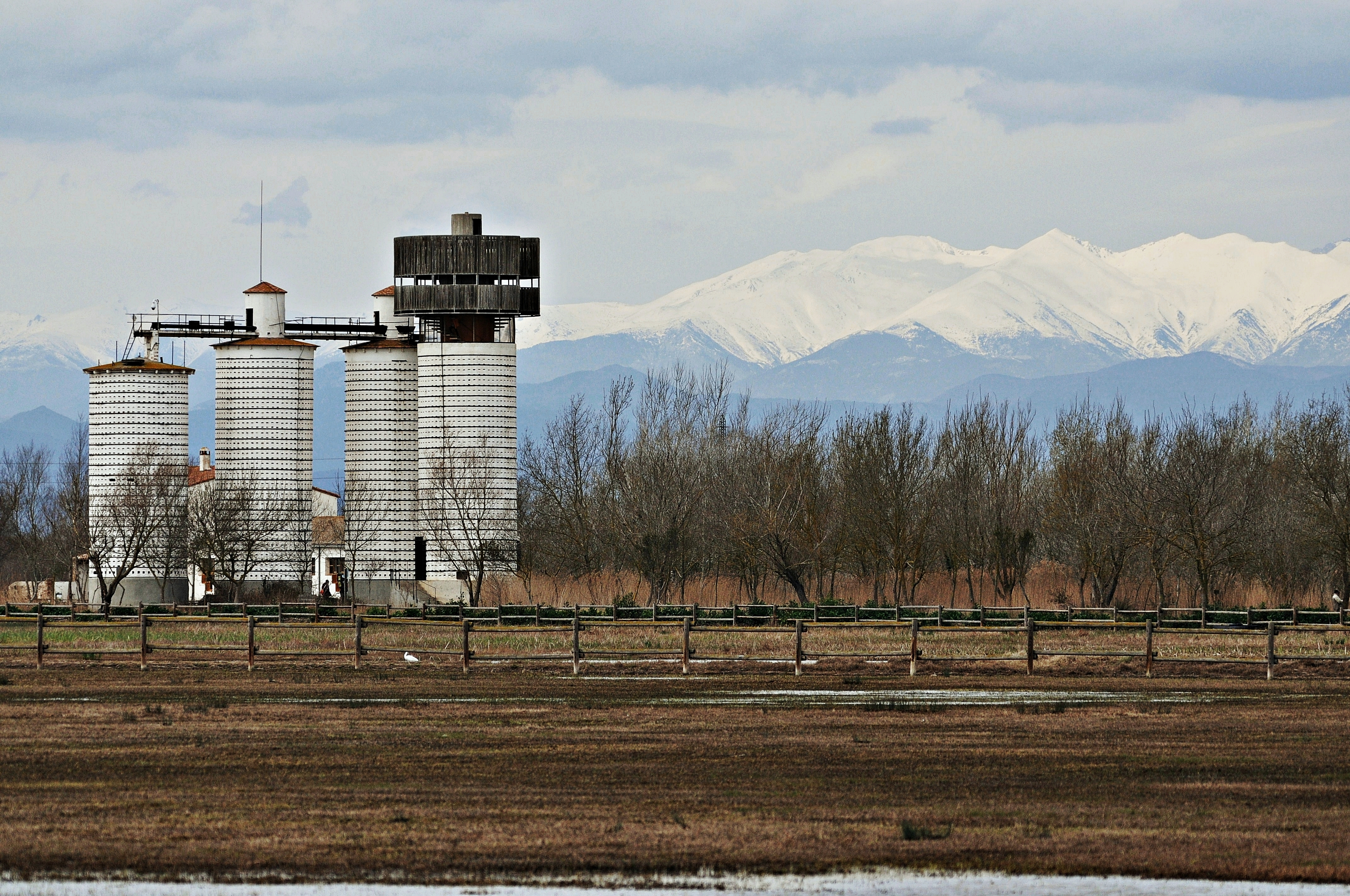 mirador de senillosa-alt emporda-cataluña